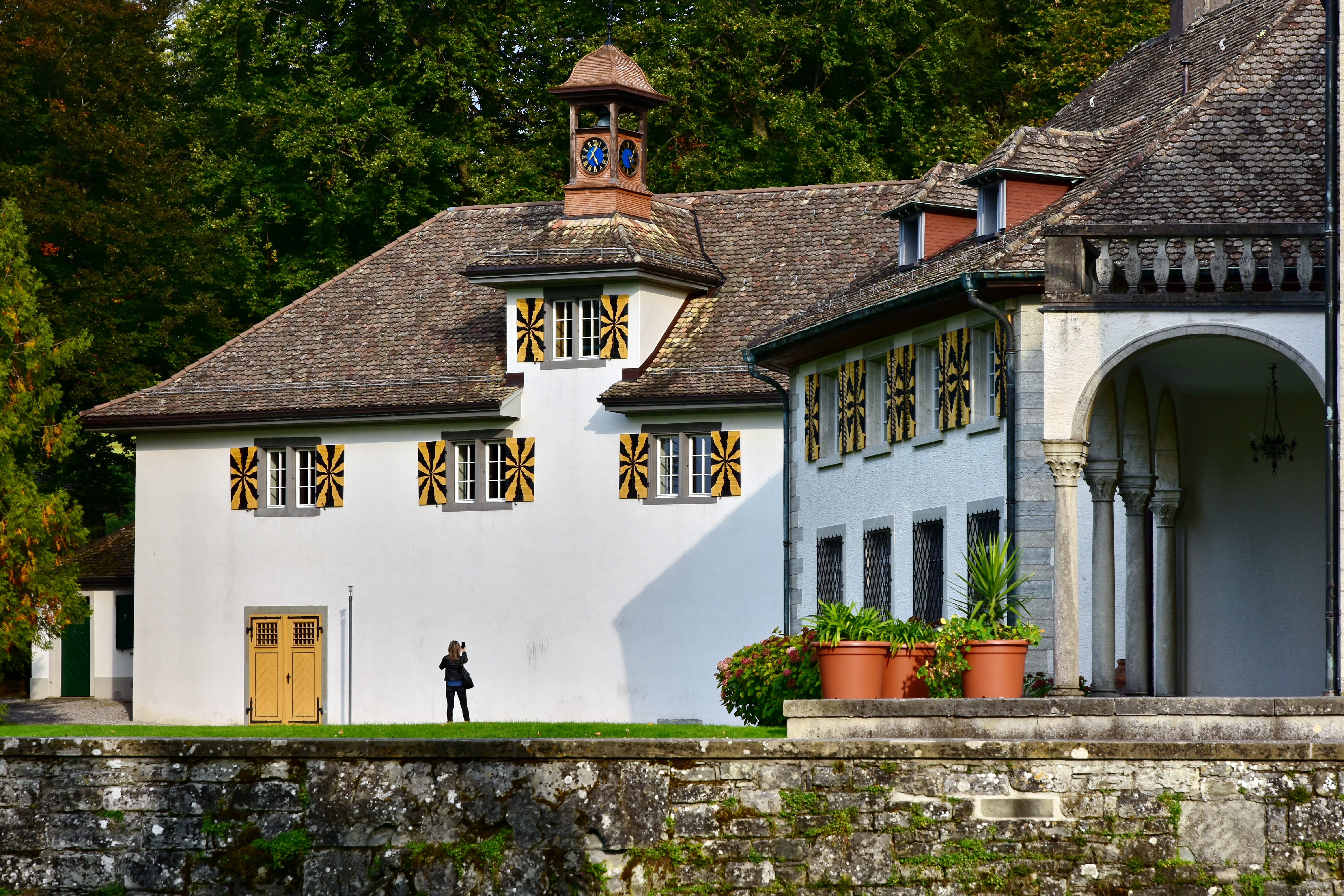 Schloss Au on Au peninsula in Au on Zürichsee lake shore in Switzerland